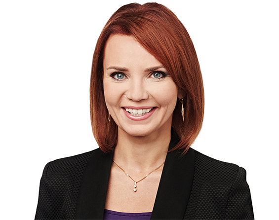 Keit Pentus-Rosimannus